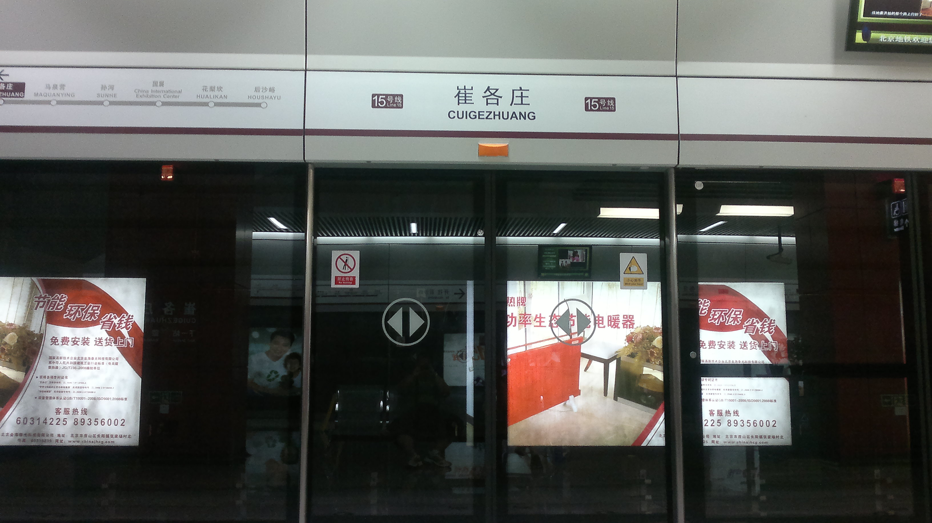 北京地铁15号线崔各庄站